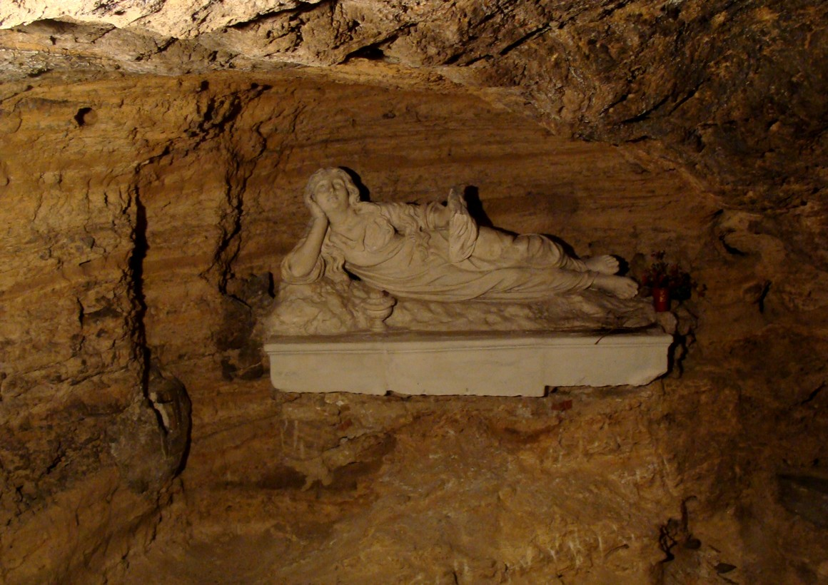 La statue de Marie-Madeleine allongée dans la grotte où elle aurait dormi sur son chemin des Saintes-Maries-de-la Mer à la Sainte-Baume. Contiguë à l'église des Aygalades, à Marseille.